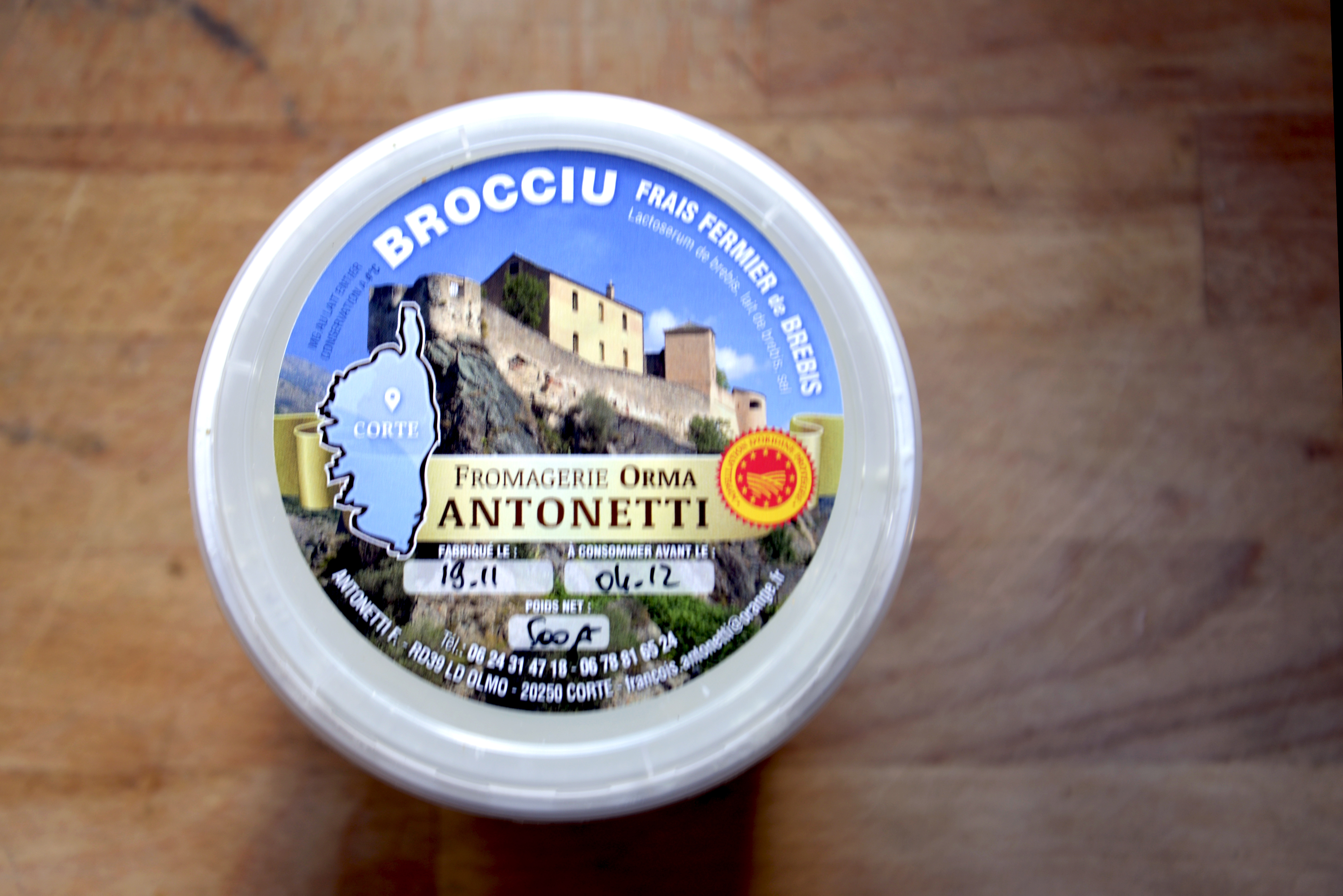 Corte, Centre Corse (Haute-Corse) - Brocciu fermier de brebis de la fromagerie ORMA Antonetti